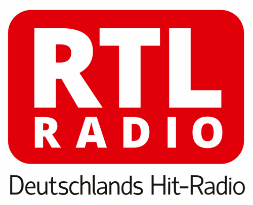 Logo von RTL – Deutschlands Hit-Radio